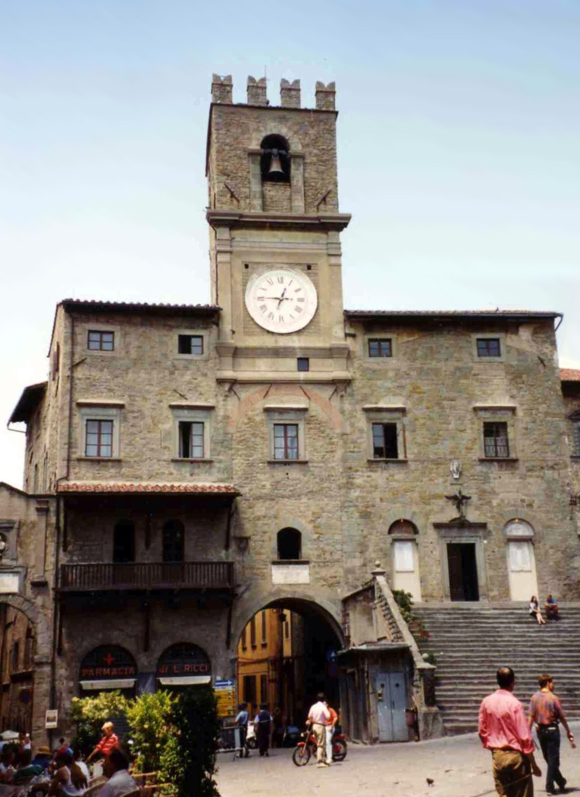 Fotografia del Palazzo Comunale di Cortona (AR)